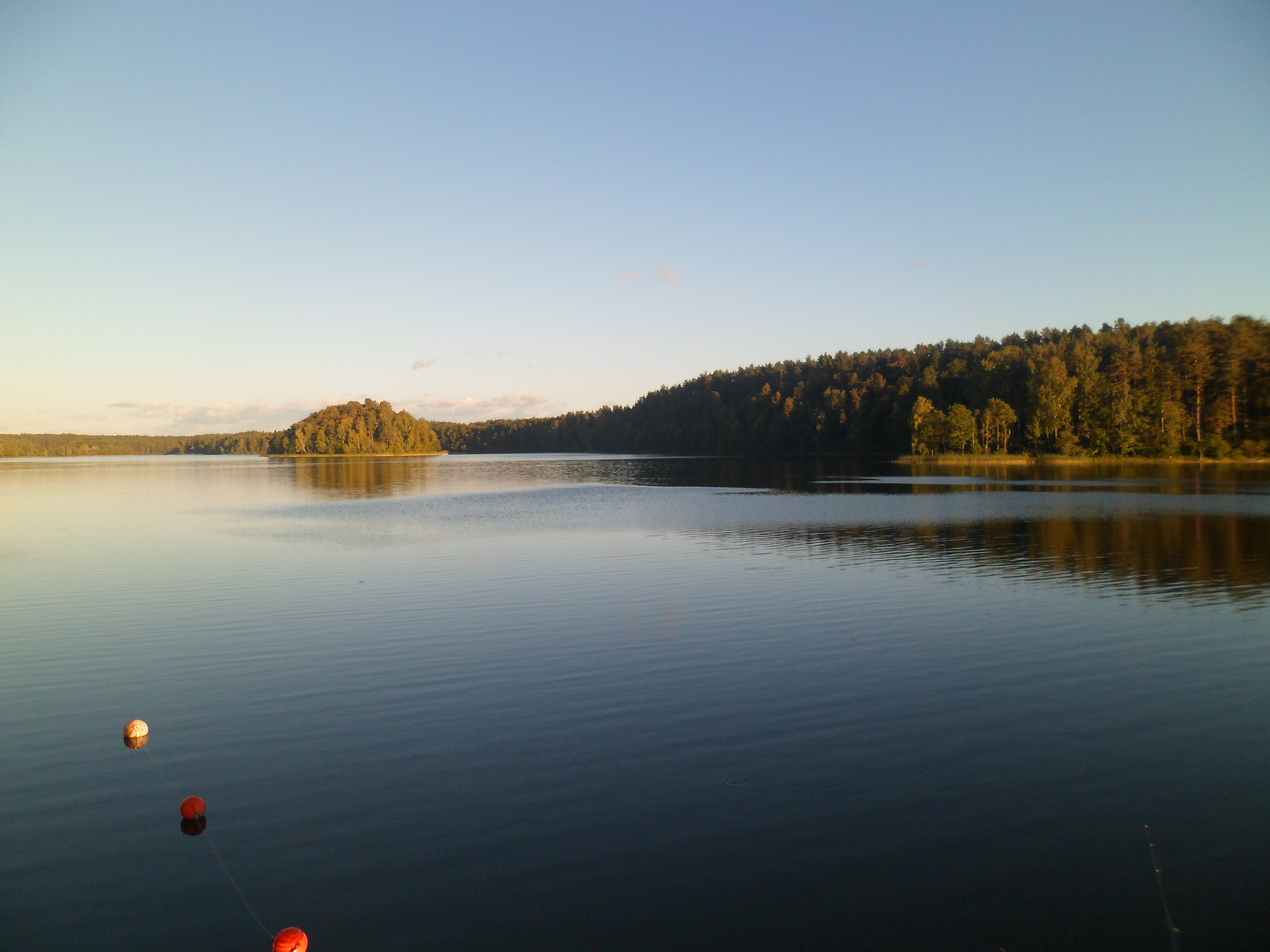 Вильнюс қаласына ең жақын орналасқан өзен.